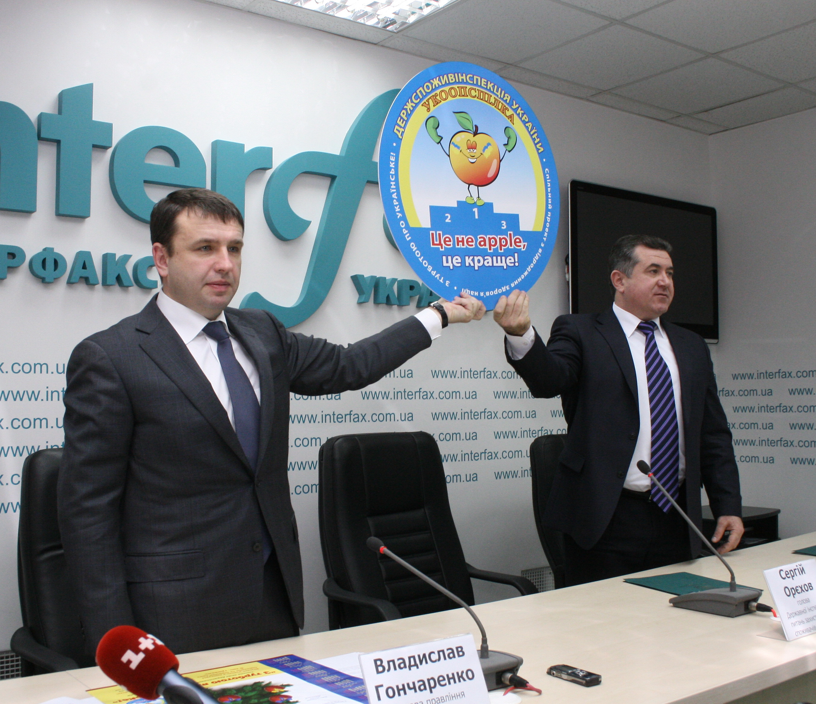 Председатель Правления Укоопсоюза Владислав Гончаренко и Глава Государственной инспекции Украины по вопросам защиты прав потребителей презентуют эмблему Всеукраинской патриотической акции "З турботою про Українське!"